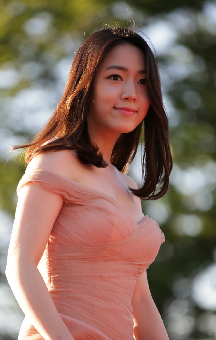 제19회 부천국제판타스틱영화제 레드카펫 part.3